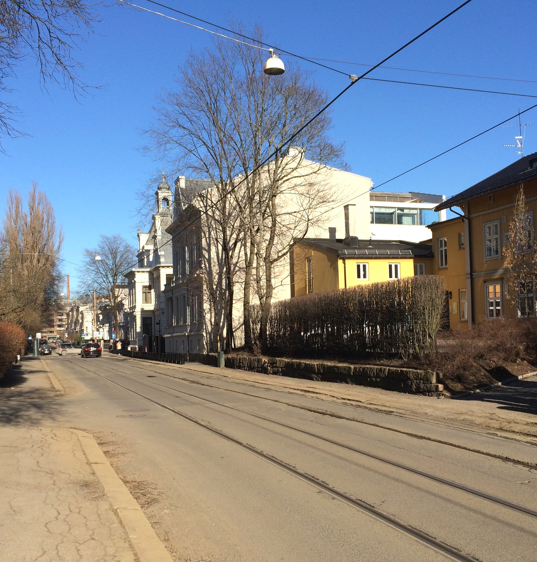 Inkognitogata nordøstover